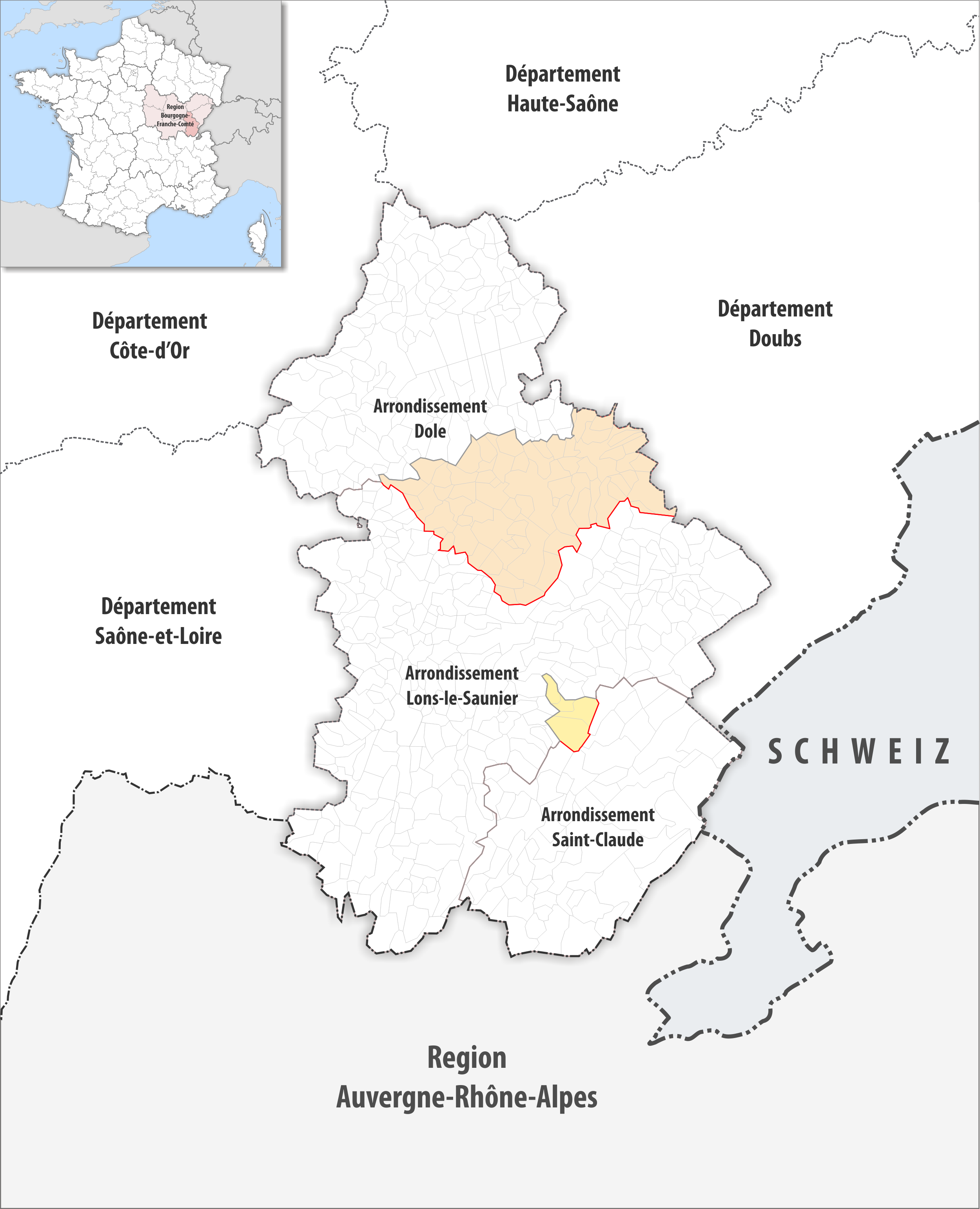 Arrondissements Anpassungen auf 2017 im Departement Jura